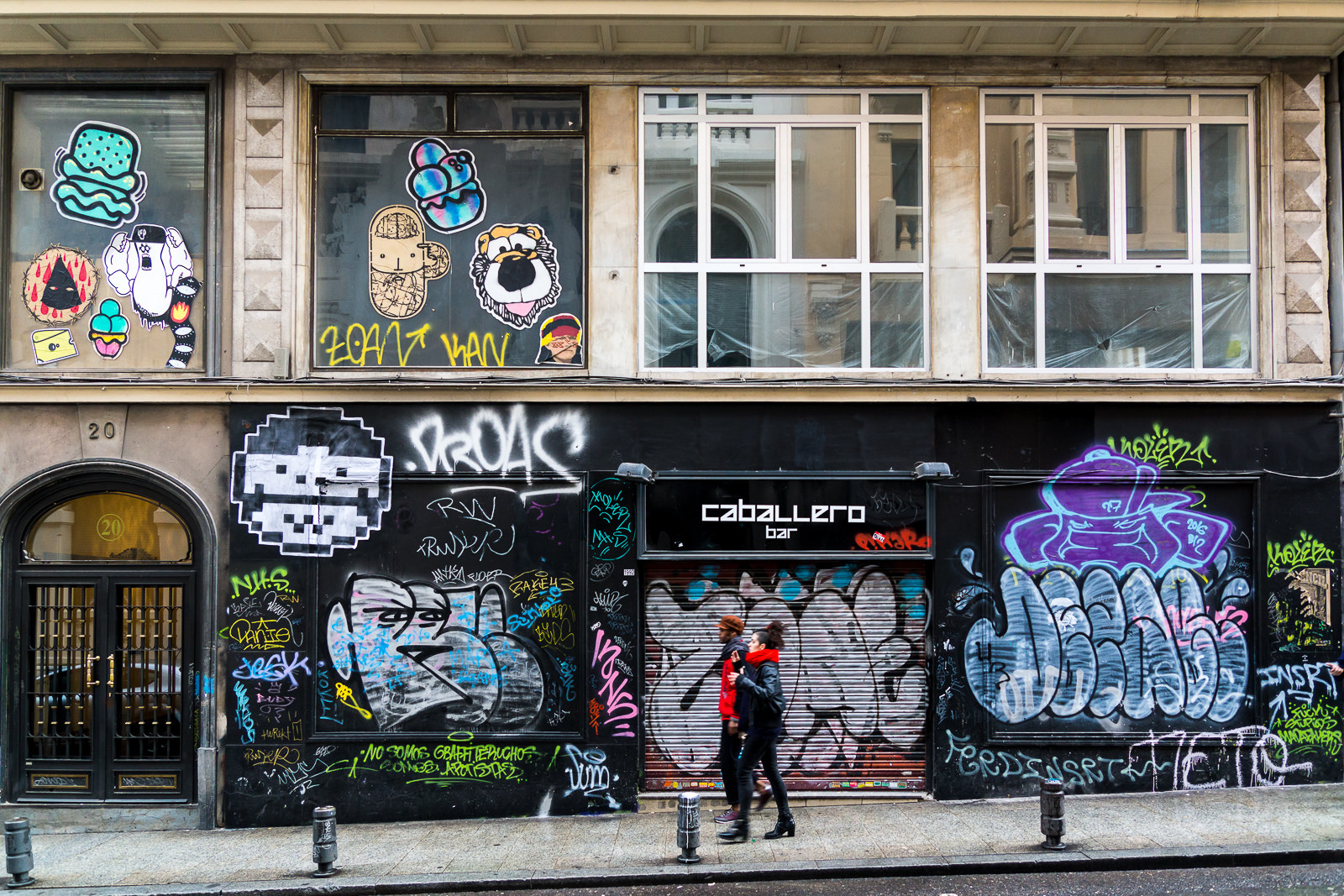 MAD - 20160320 - 9 Calle del Caballero de Gracia nº 20, Madrid, España.